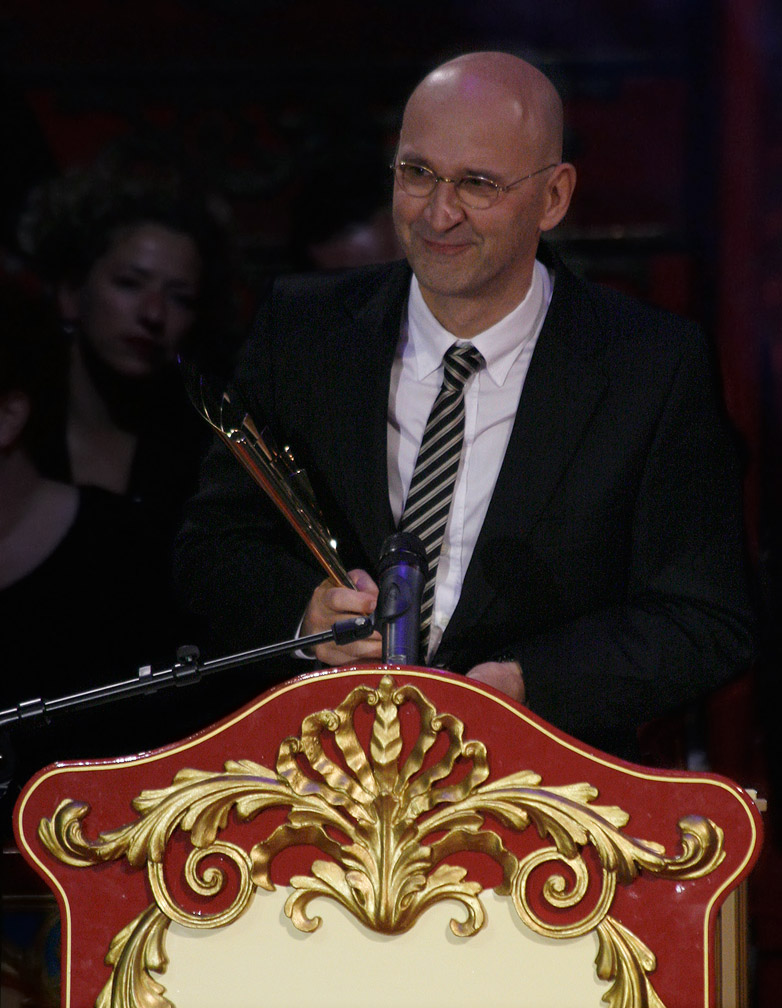 Martin Zehetgruber ausgezeichnet für die Beste Ausstattung während der Verleihung des Nestroy-Theaterpreises 2009 (Circus Roncalli auf dem Wiener Rathausplatz).